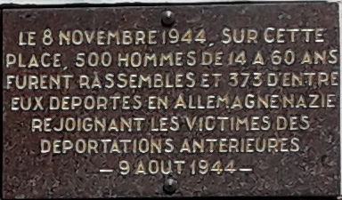 Gedenktafel an die Deportation von 373 Männern aus Moyenmoutier nach Deutschland am 4. August 1944, Rathaus Moyenmoutier